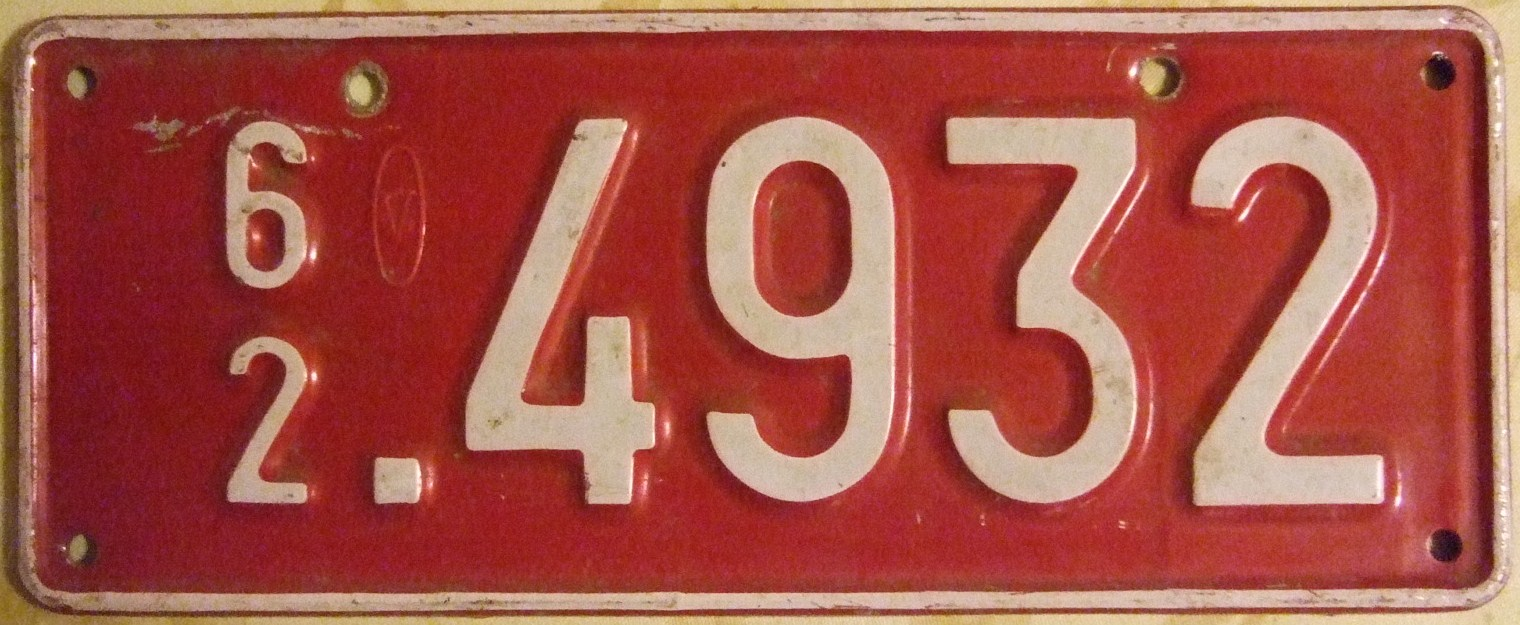 BELGIUM 1962 ---TEMPORARY PLATE